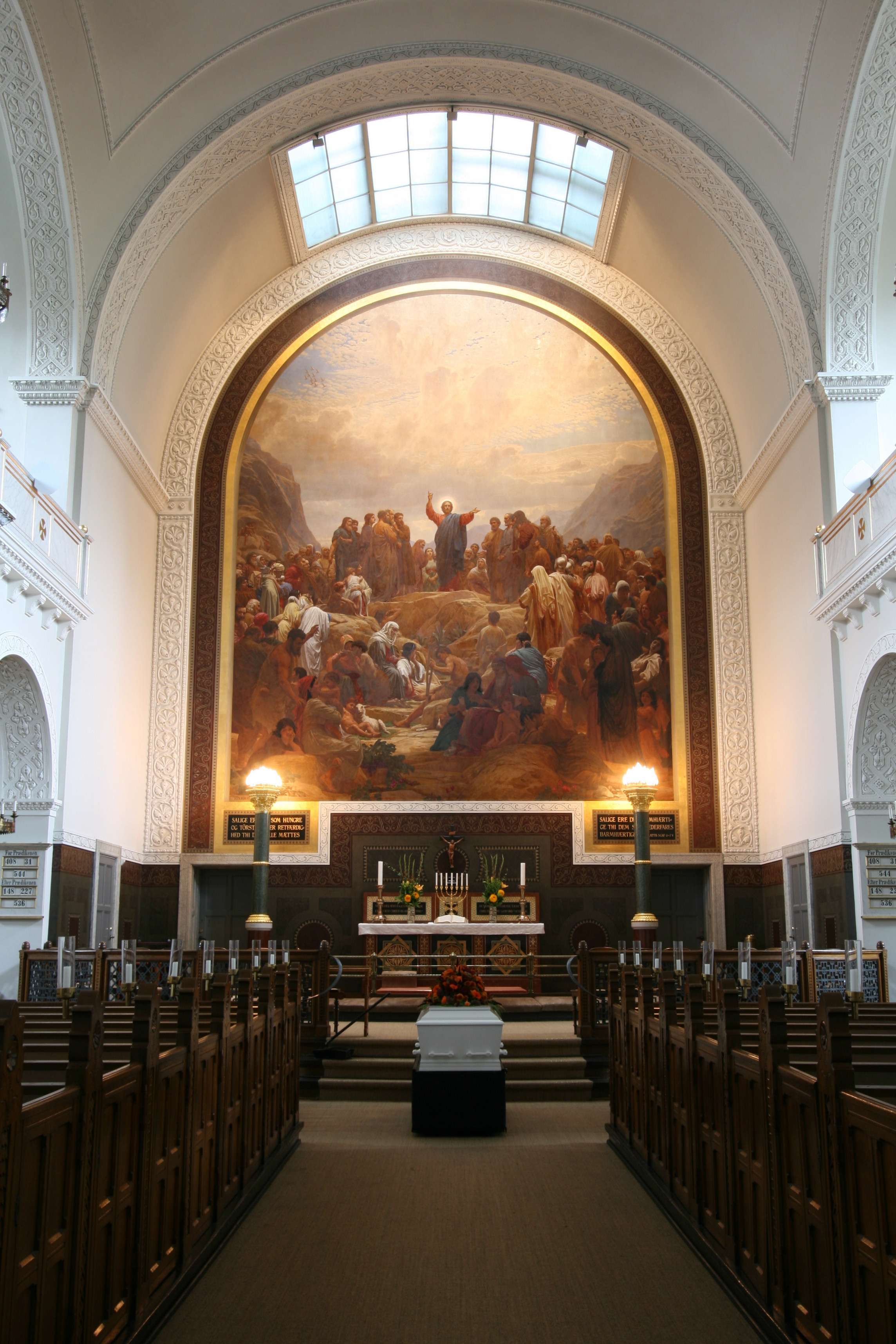 Sankt Matthæus Kirke, Copenhagen, Denmark. Quire